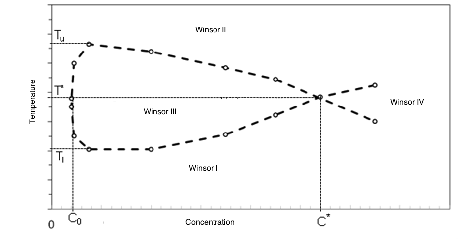 Version simplifiée d'un diagramme en poisson